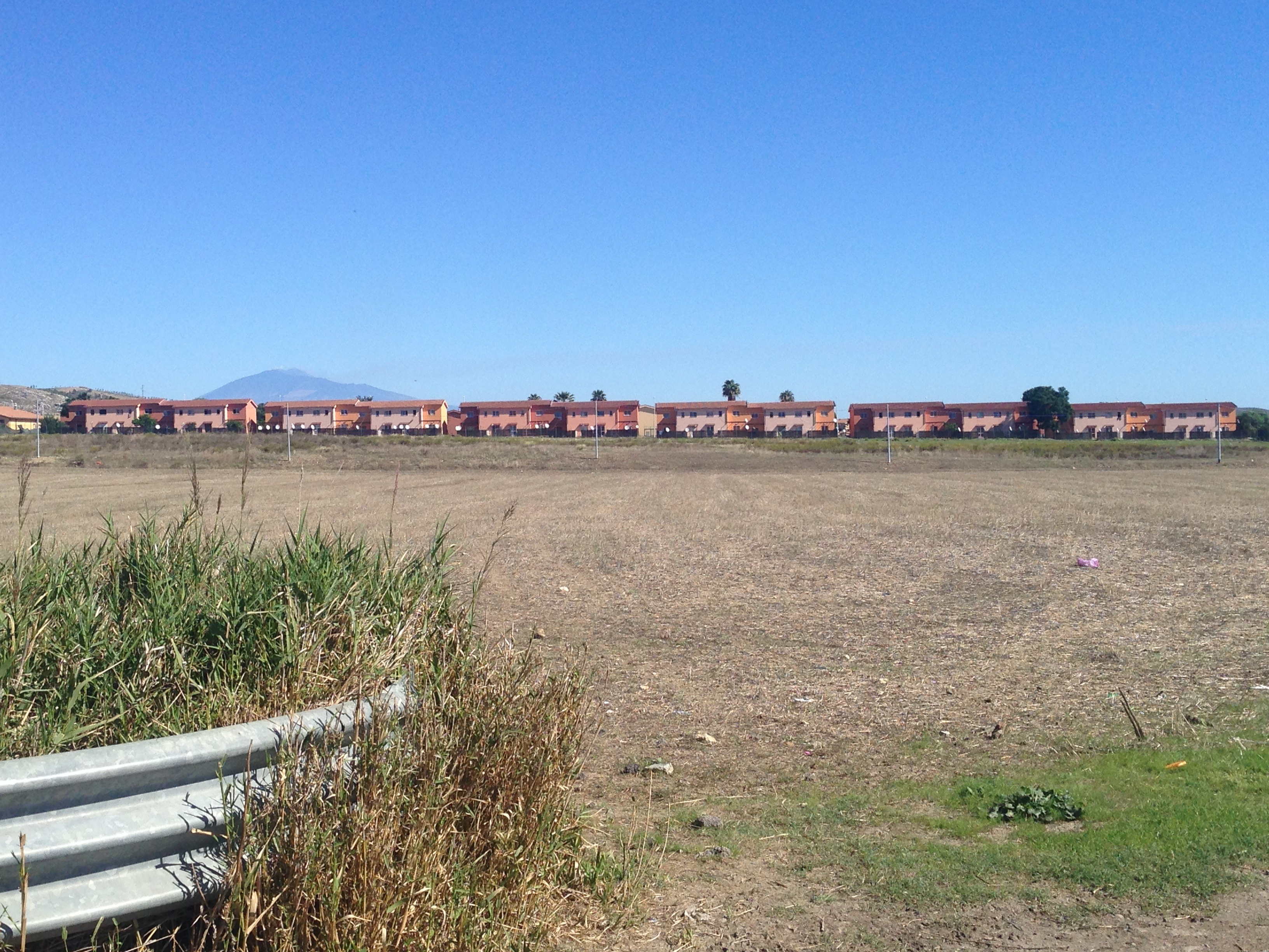 CARA di Mineo